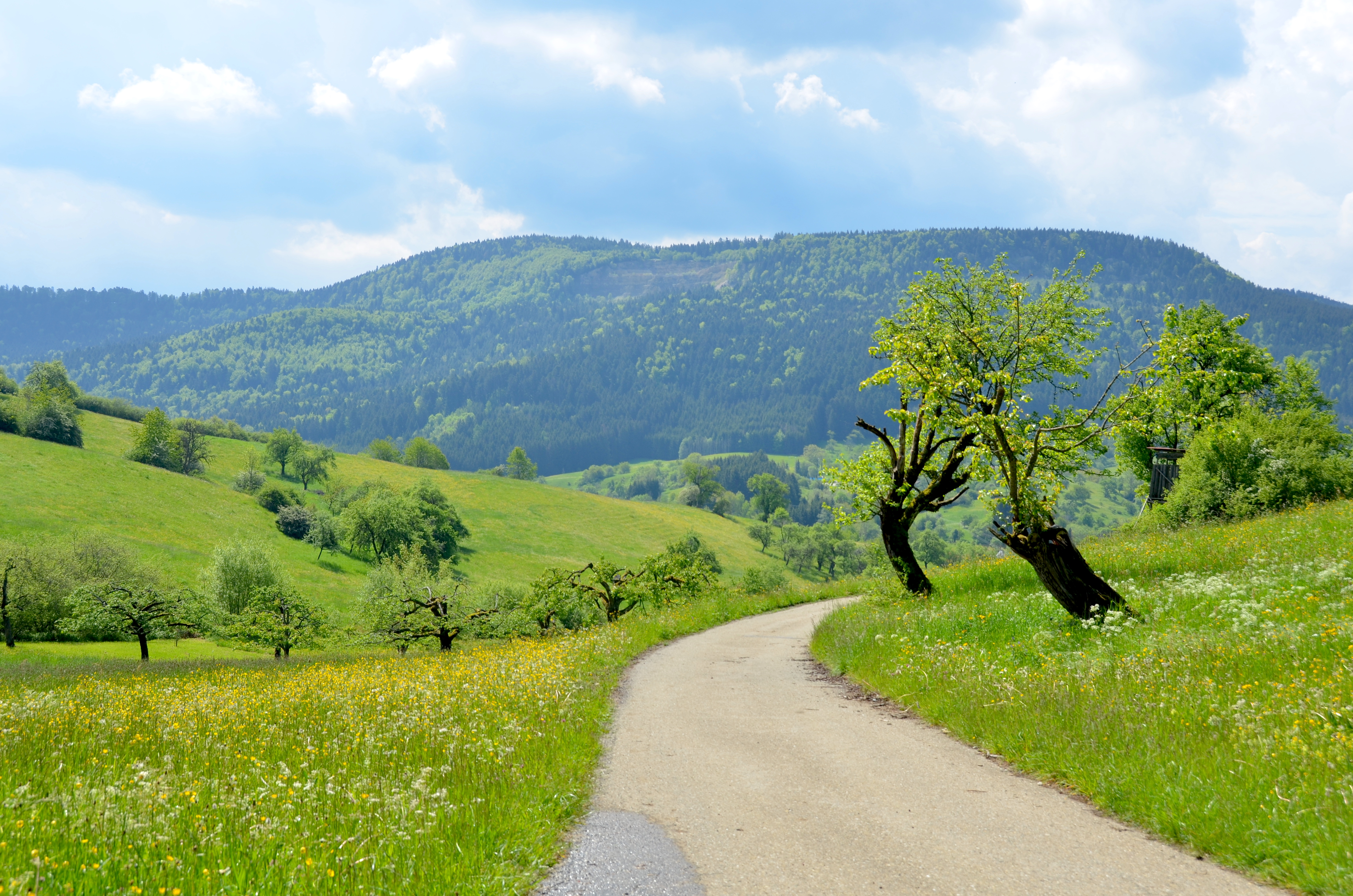 Blick über das Vogelschutzgebiet Südwestalb und Oberes Donautal zum (NSG:BW-4.300)_Ortenberg, Waldschutzgebiet Ortenberg und FFH-Gebiet Großer Heuberg und Donautal. Im Hintergrund rechts der Ortenberg, links der Rainen.